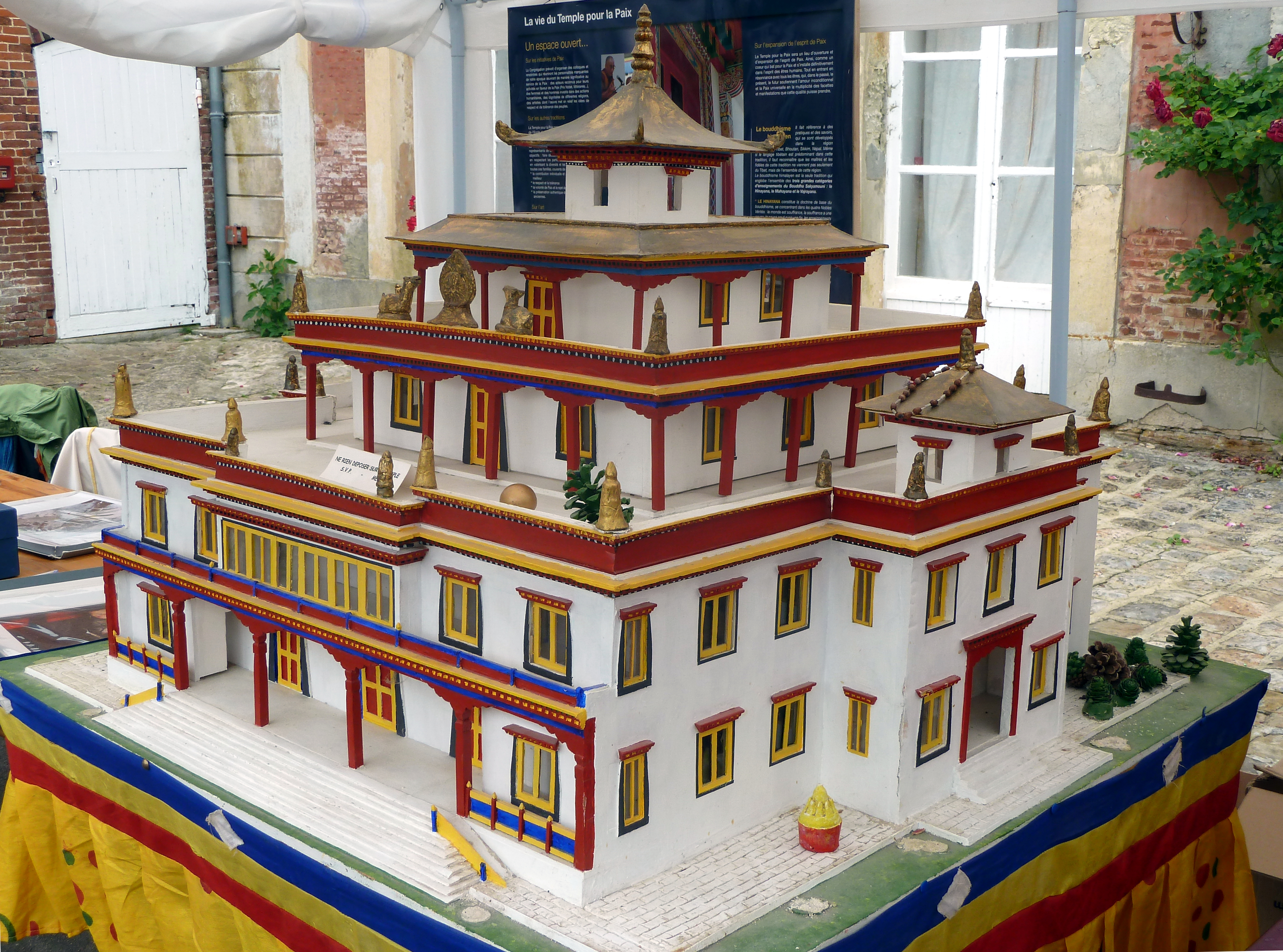 Vajradhara-Ling P1070185 maquette du Temple pour la Paix